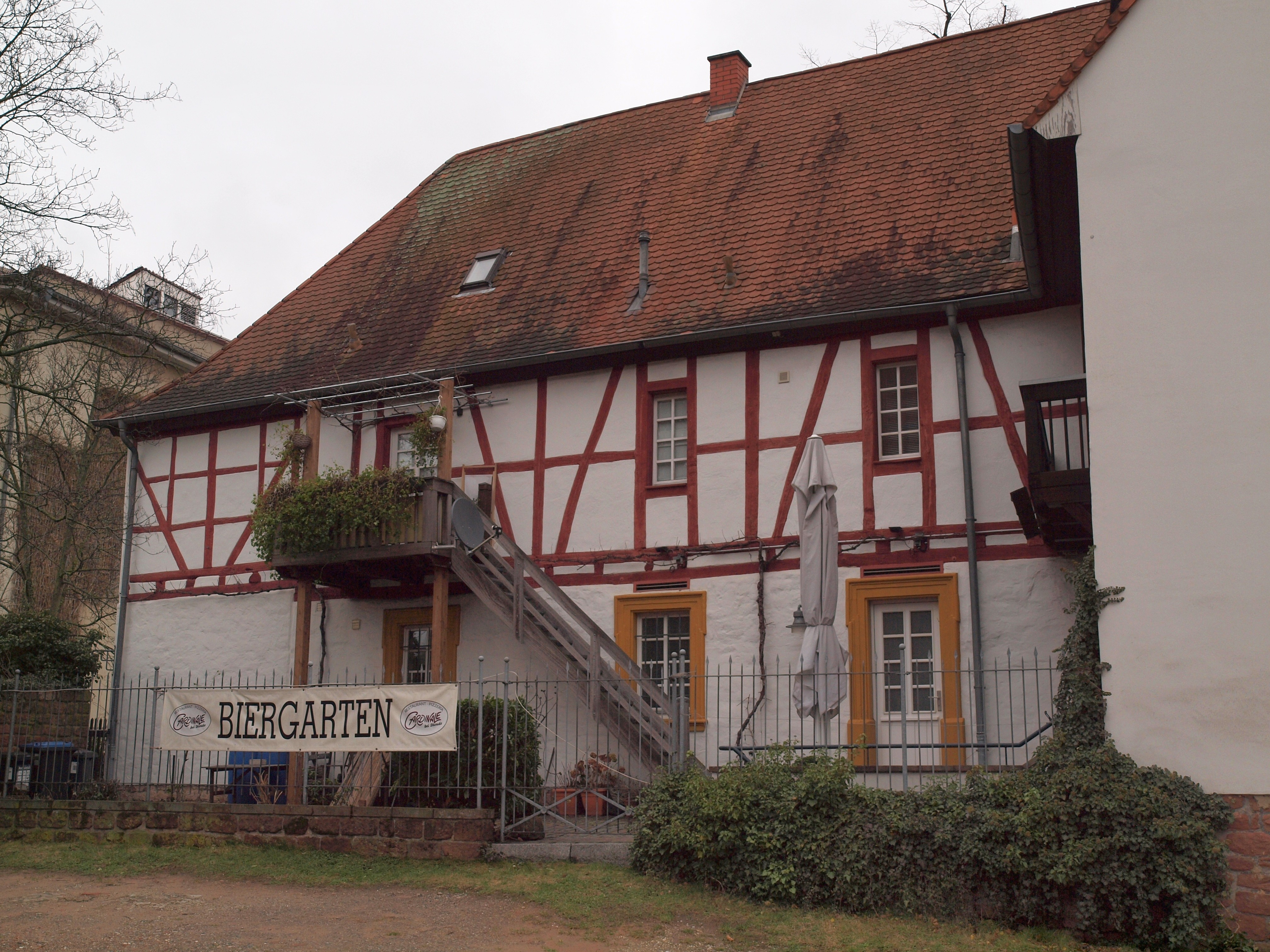 Rittersberg 14 Kaiserslautern, Ansicht von Ost